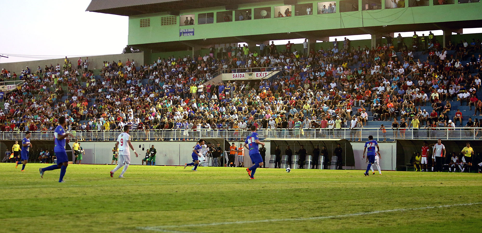 Foto: Sérgio Vale/Secom